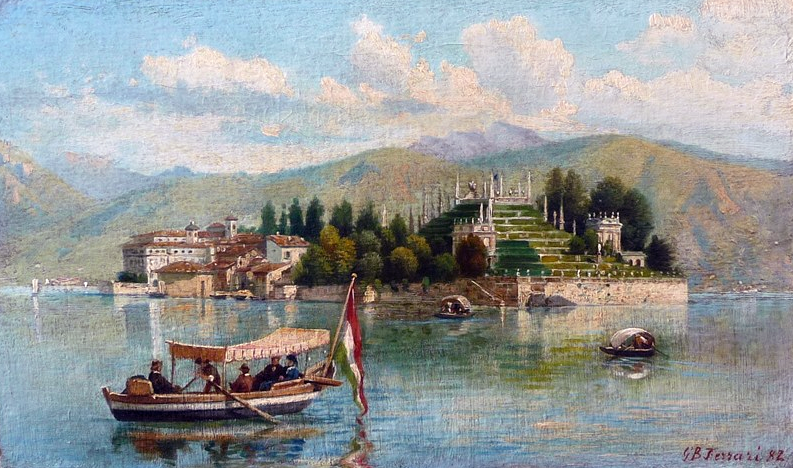 Isola Bella, olio su cartone, collezione privata